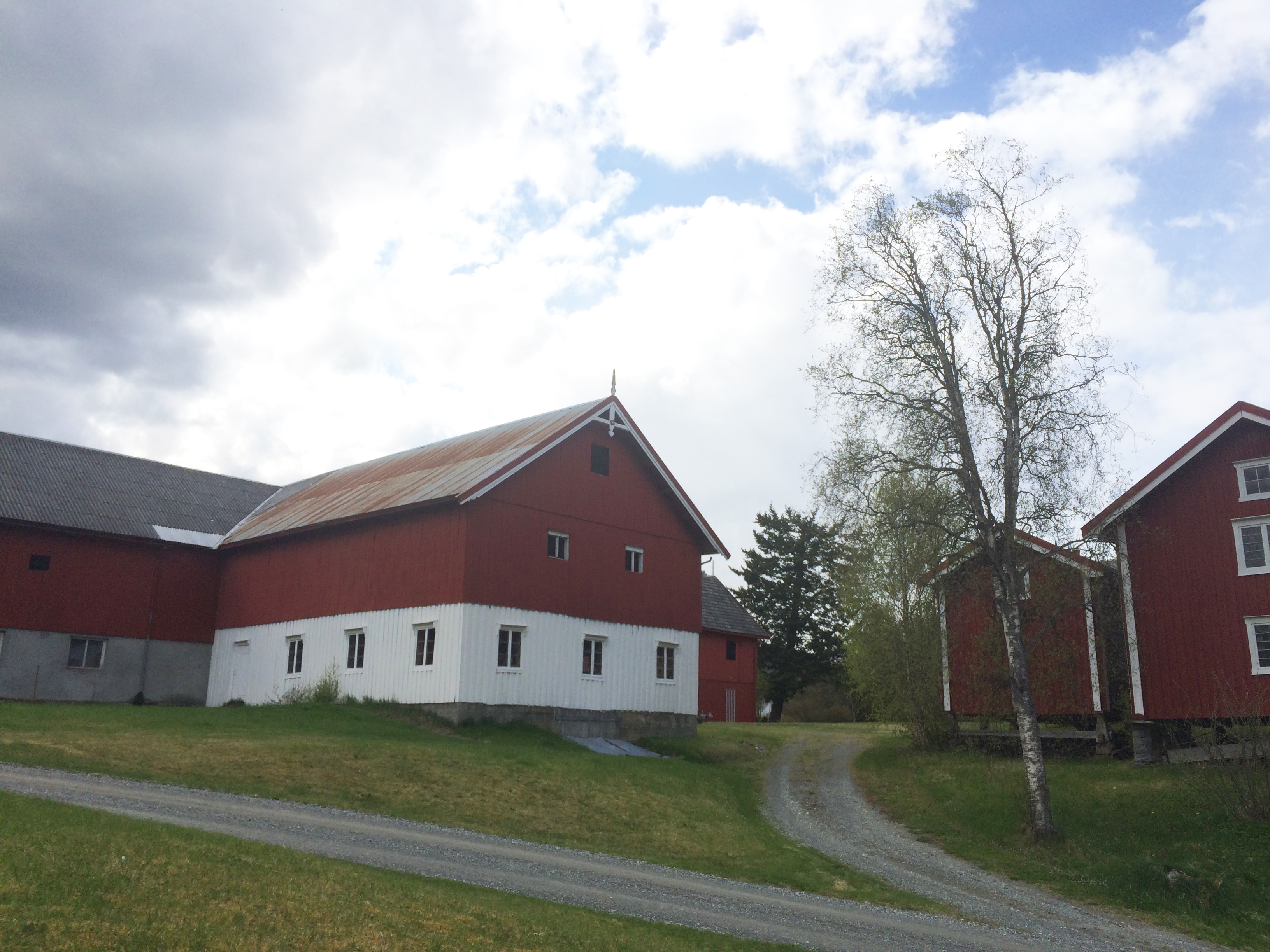 Adkomst (veien til høyre) til tunet på Gjesvål, Orkdal kommune, mellom driftsbygning og stabbur